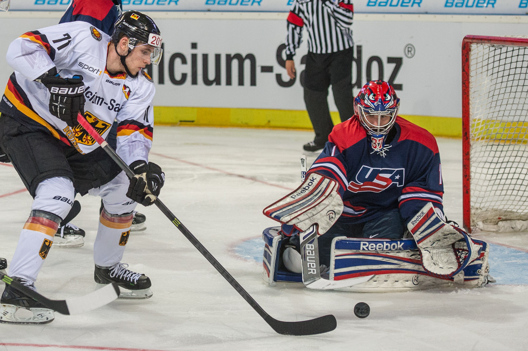 Leon Draisaitl im WM-Vorbereitungsspiel gegen die USA in Nürnberg vor US-Goalie Connor Hellebuyck